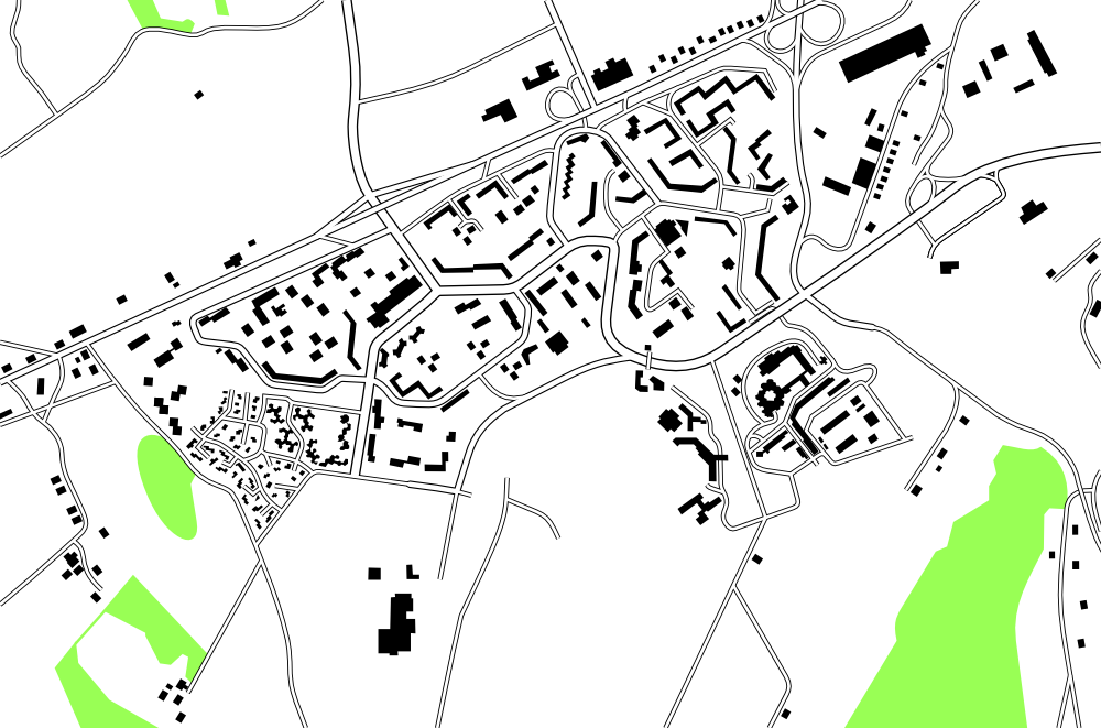 Plan du quartier de Planoise à Besançon réalisé à partir des cadastres de 1834.